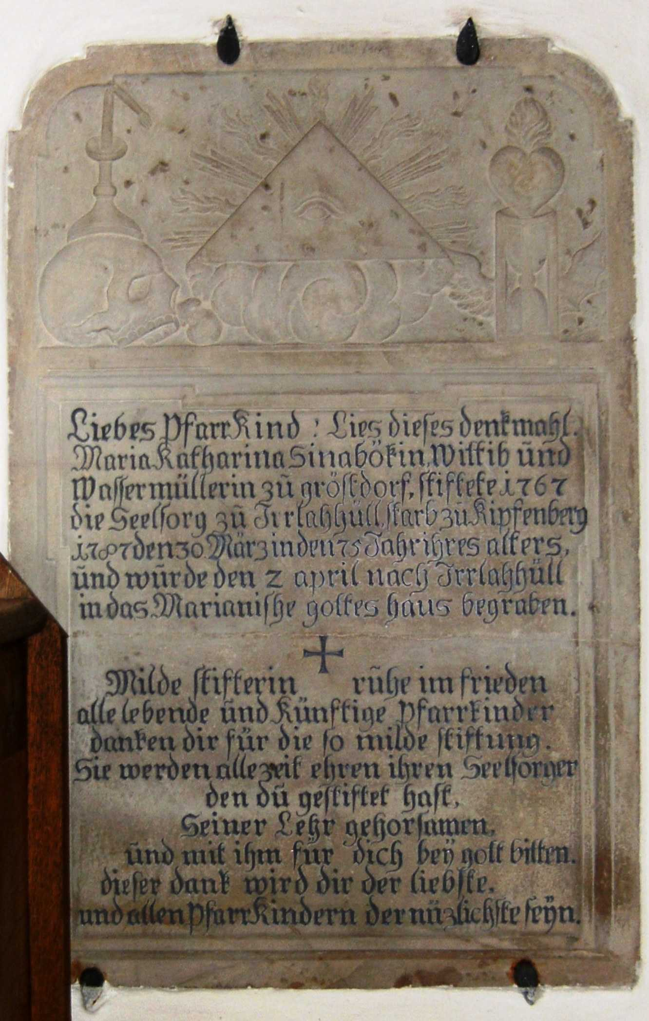 Grabstein des 18. Jahrhunderts aus Kalkstein in der Kirche von Irlahüll, Gemeindeteil von Kipfenberg im Landkreis Eichstätt, Bayern